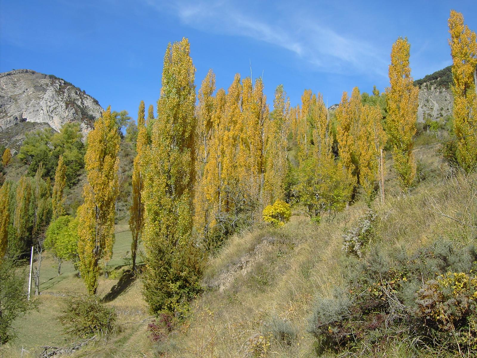 Los chopos son sin duda la especie arbórea más característica del Valle de La Comuna.